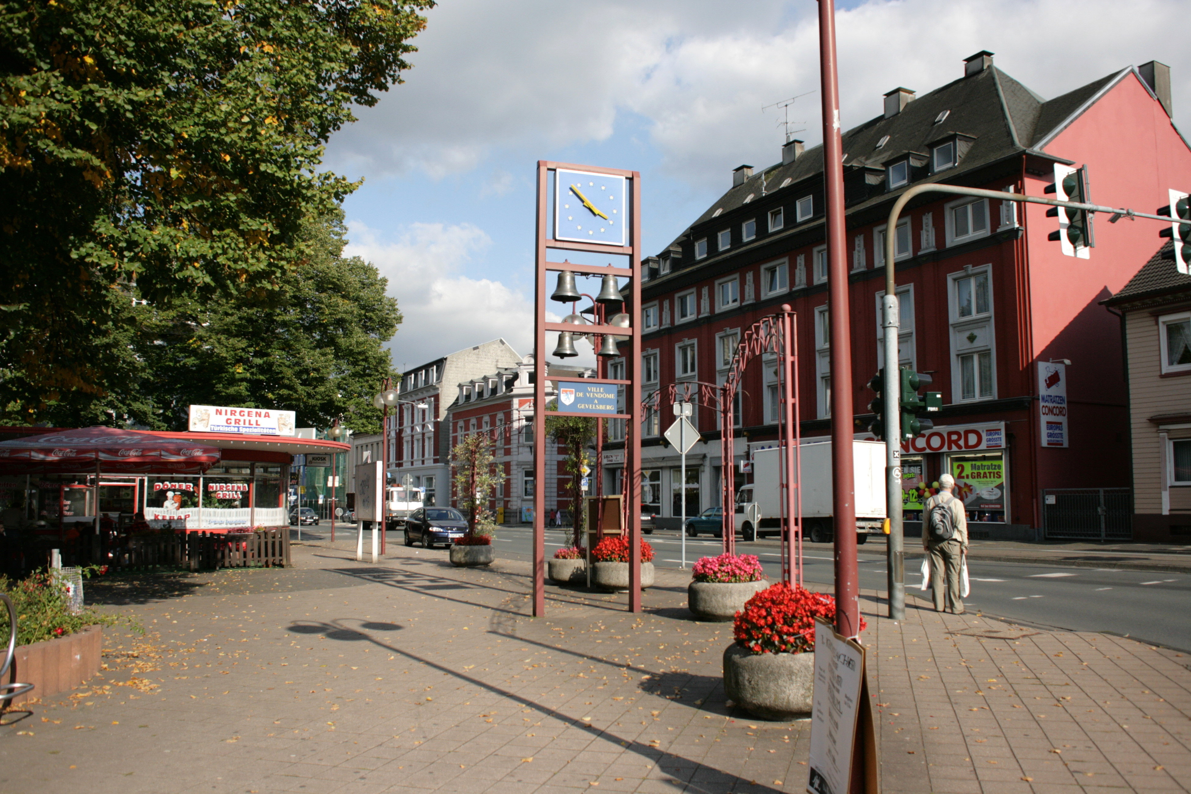 Ecke Nirgenaplatz / Hagener Straße in Gevelsberg